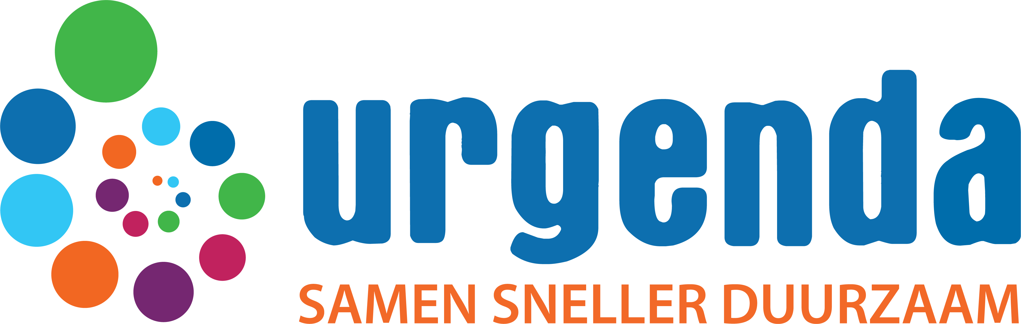 Logo von